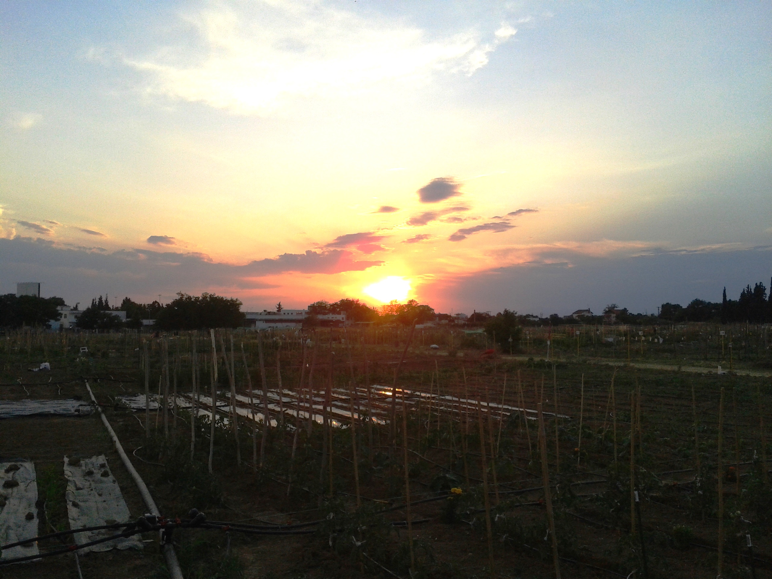 Sunset at Aristotl University of Thessaloniki peri-uban gardens at Greece